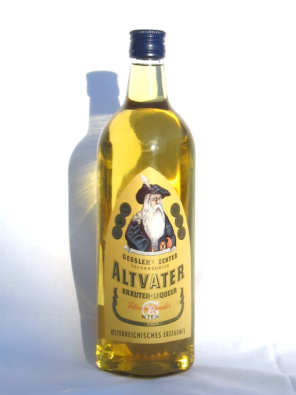 Altvater liqueur by E. Gessler